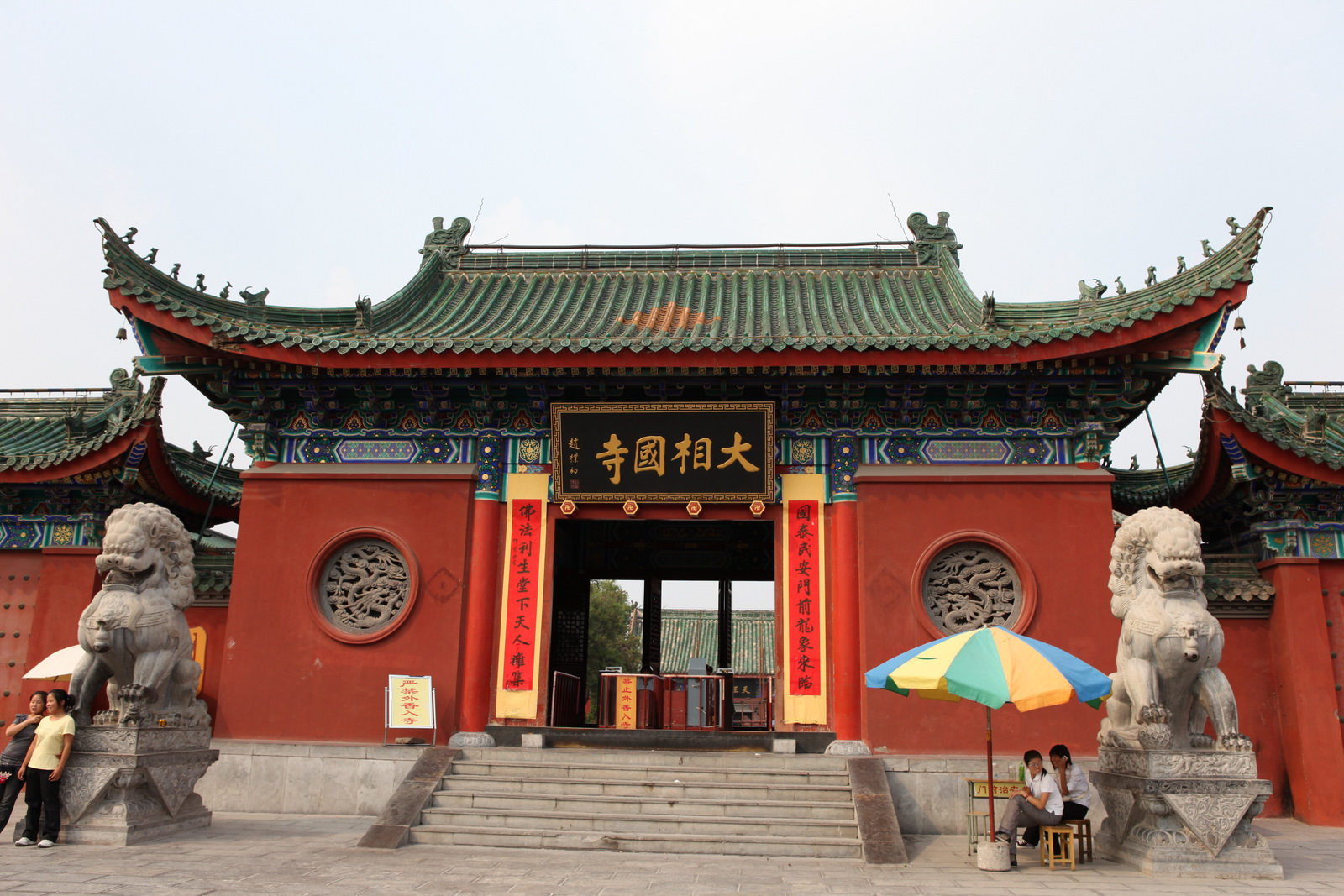 开封相国寺 Xiangguo Temple